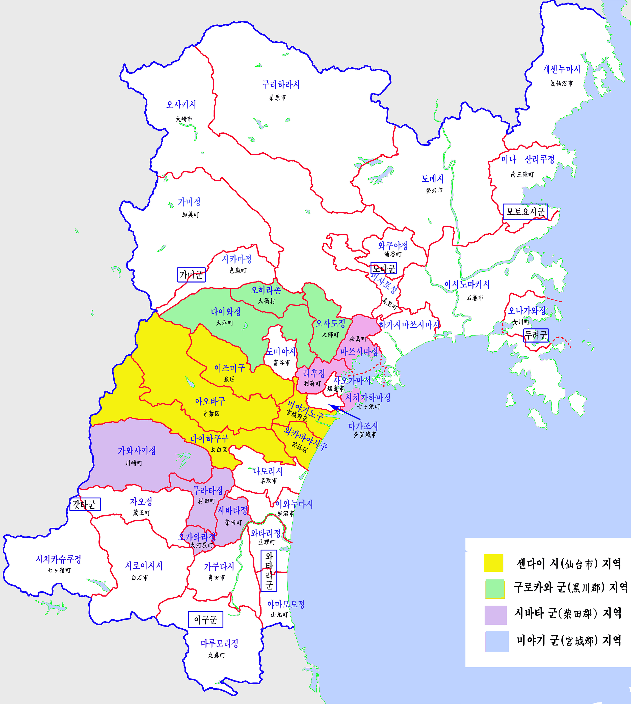 미야기현 지도